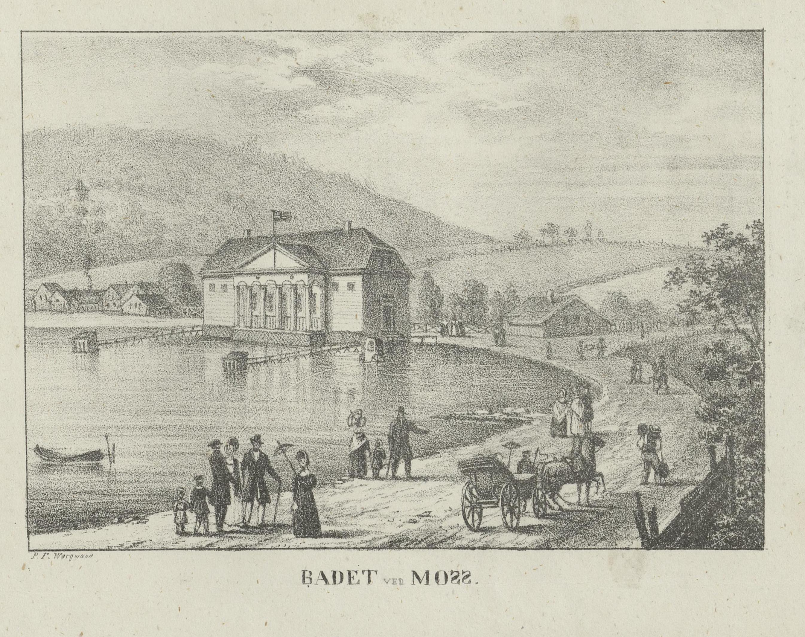 Illustrasjon hentet fra boken "Norge, fremstillet i lithographerede Billeder efter Naturen" av Wergmann, P.F. og utgitt av P.F. Wergmann (Christiania, 1836-1837). Illustrasjonen viser Moss Kurbad som åpnet 17. juni 1835 og stengte i 1958, bygningen revet i 1968. Ble også kalt Moss Søbadindretning. Badet lå innerst i Værla, på sørsiden av Strandgata, Jeløya.